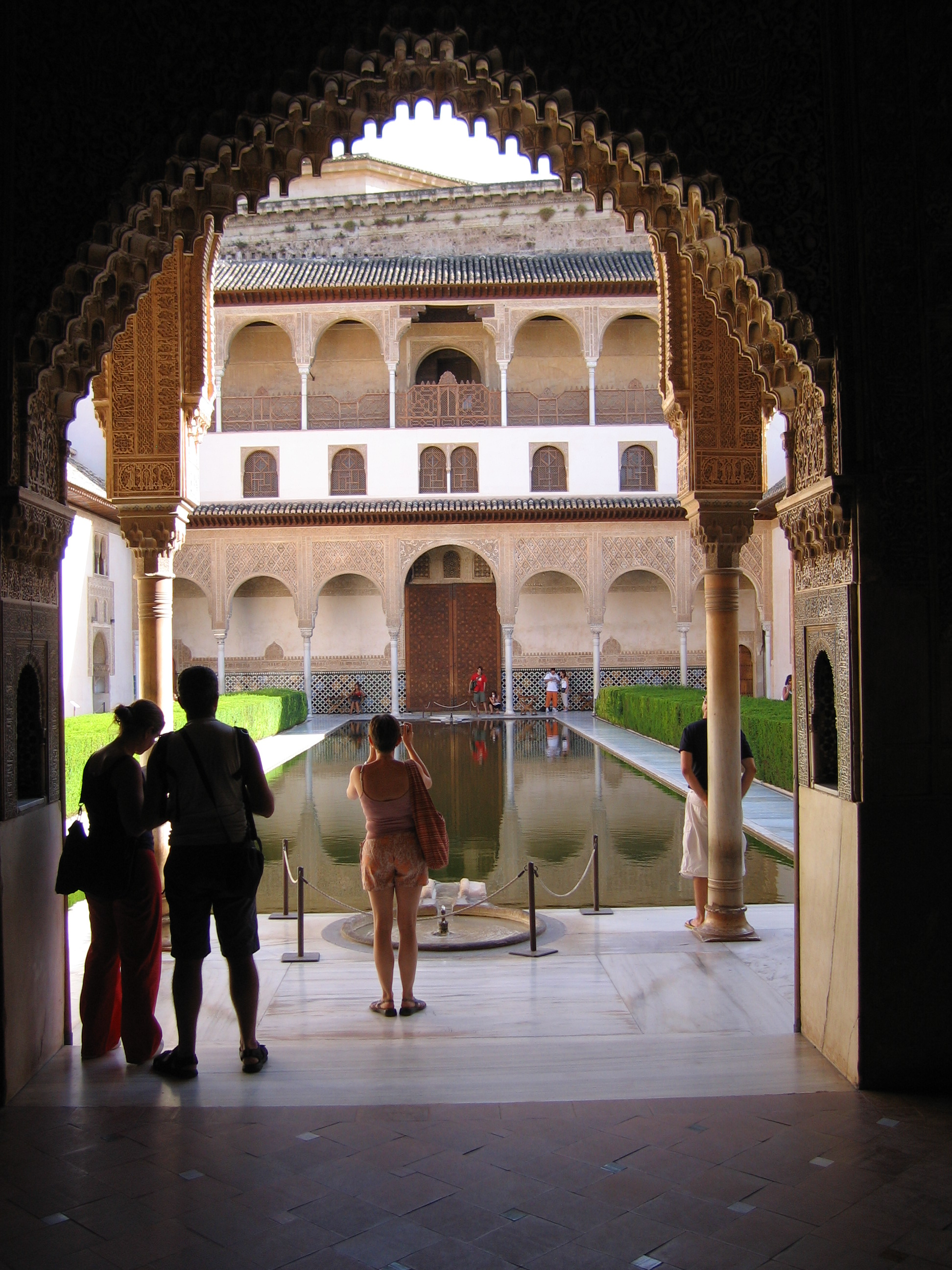 Patio de los Arrayanes en el Palacio de Comares de la Alhambra, Granada. Al fondo la conexión original con el Palacio de Carlos V.